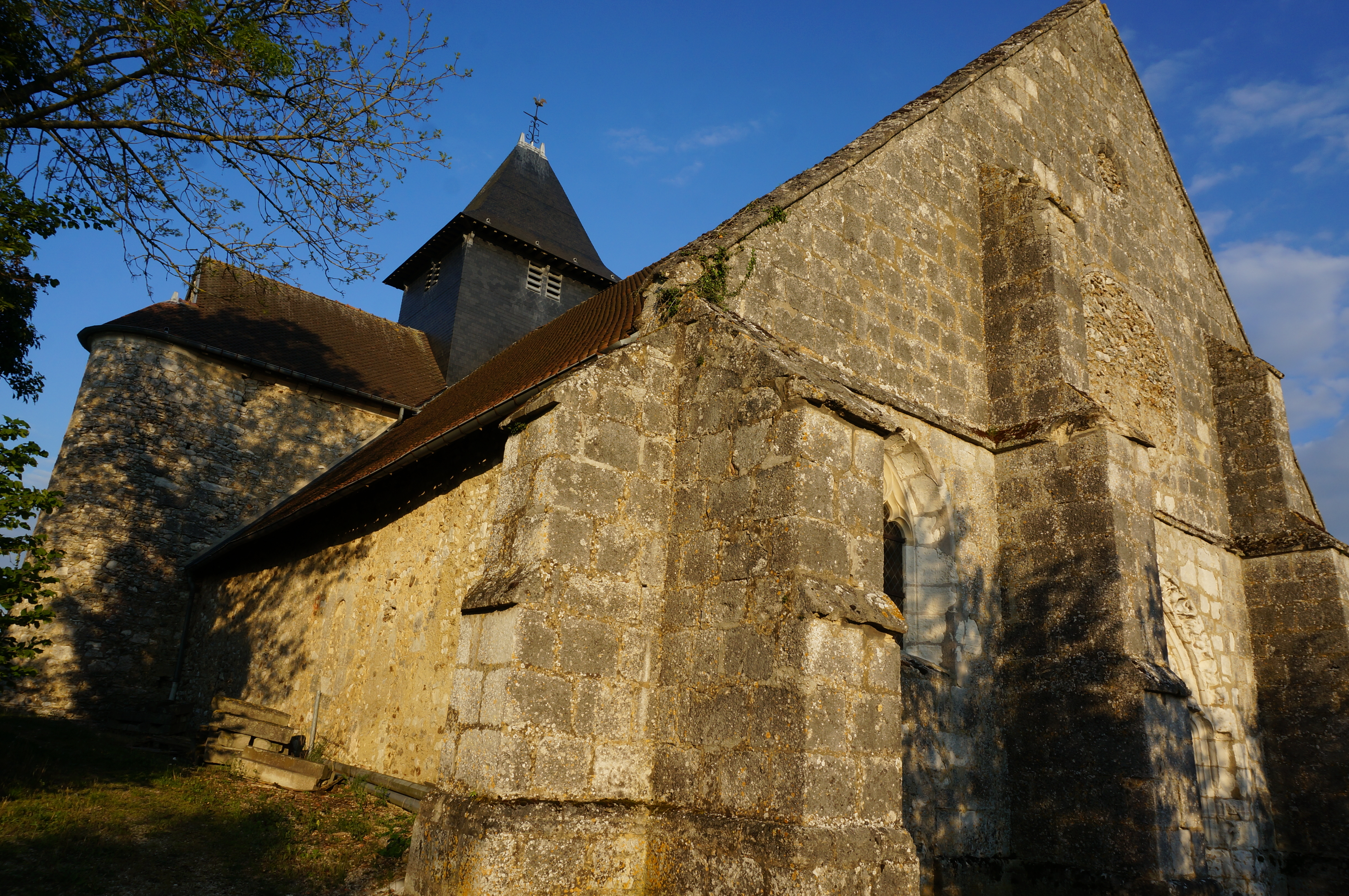 visible à Beaunay.